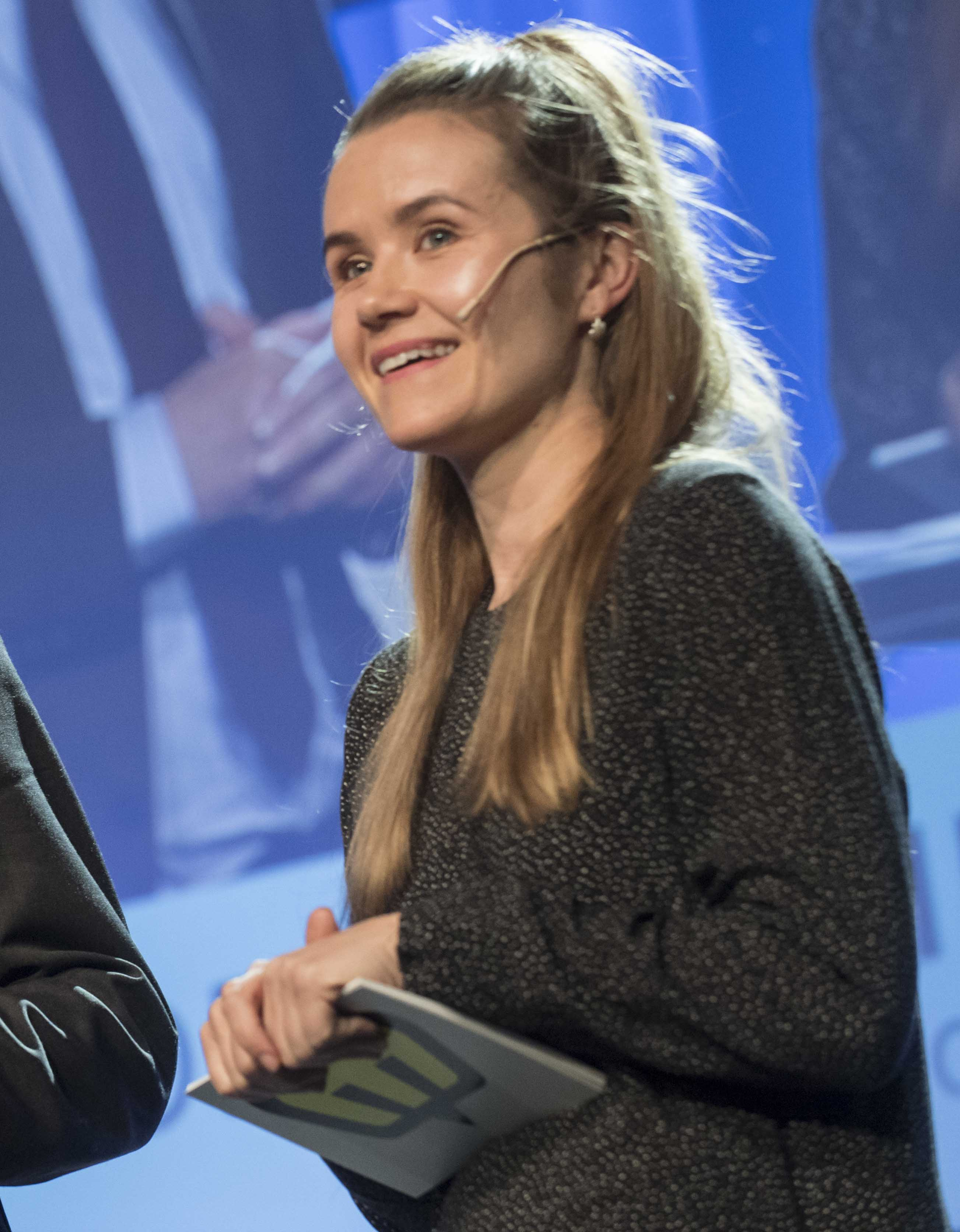 åpning onsdag kveld